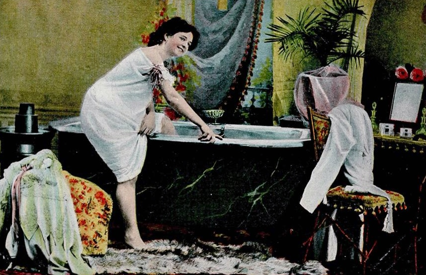 La esposa de un granjero piensa en el sufrimiento de otra persona.